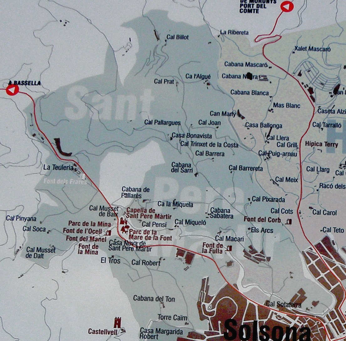 Mapa de la partida de Sant Pere Màrtir (Solsona)